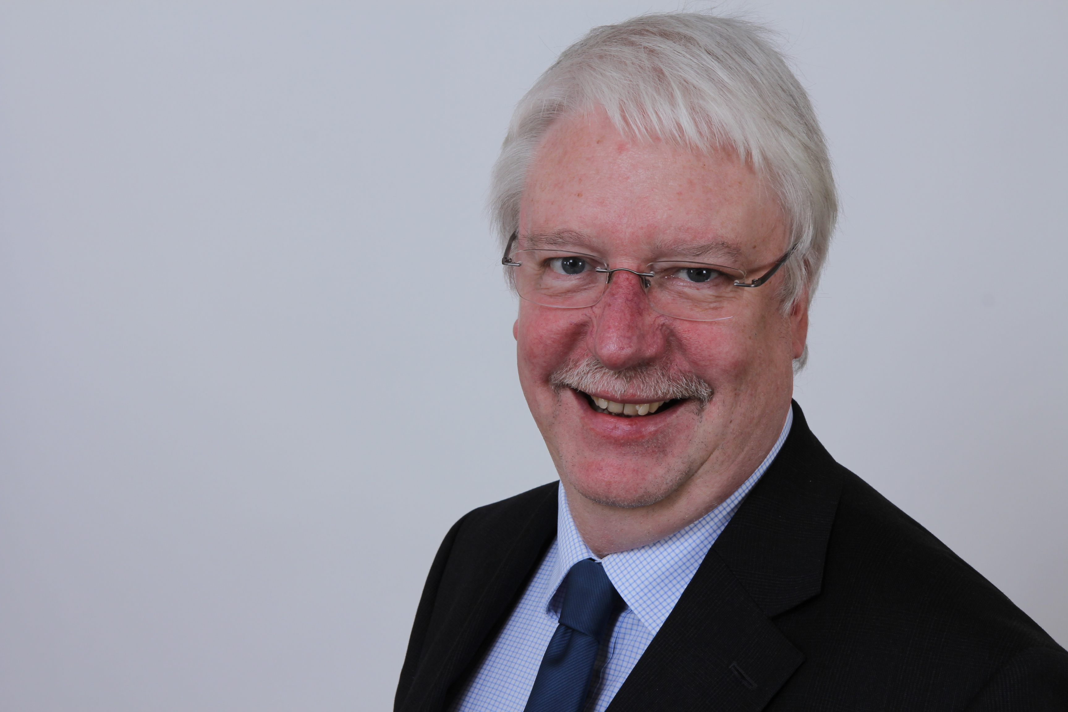 Jörg-Uwe Hahn, hessischer Politiker (FDP) und hessischer Justizminister.